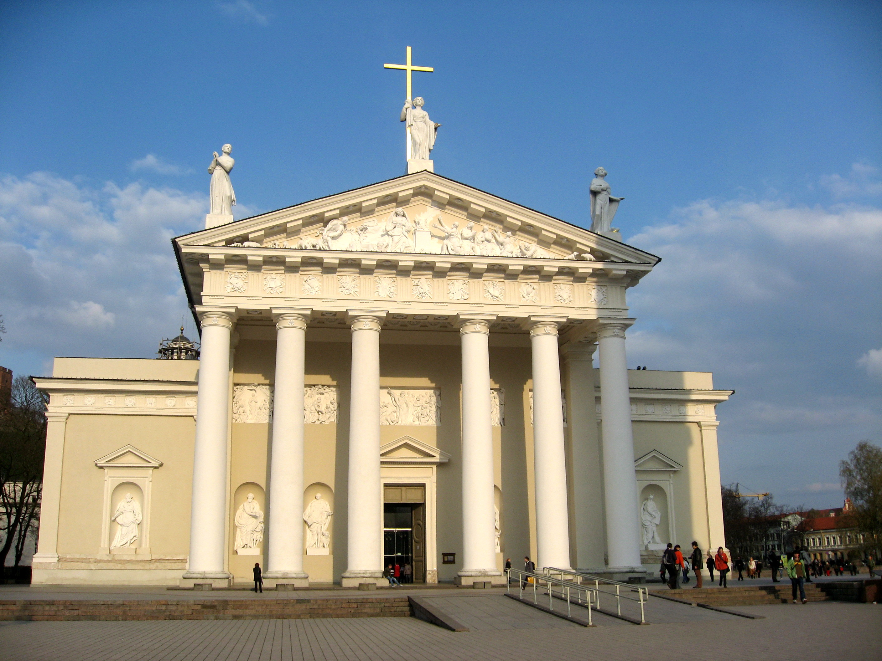 Vilnius, katedrála